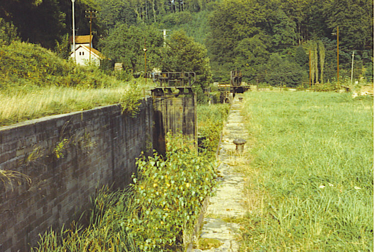 Propre Photo